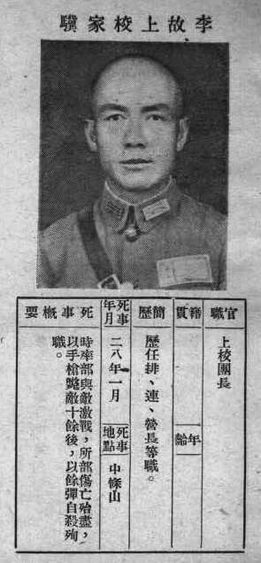 中文（台灣）: 抗戰軍人忠烈錄第一輯中的烈士遺像